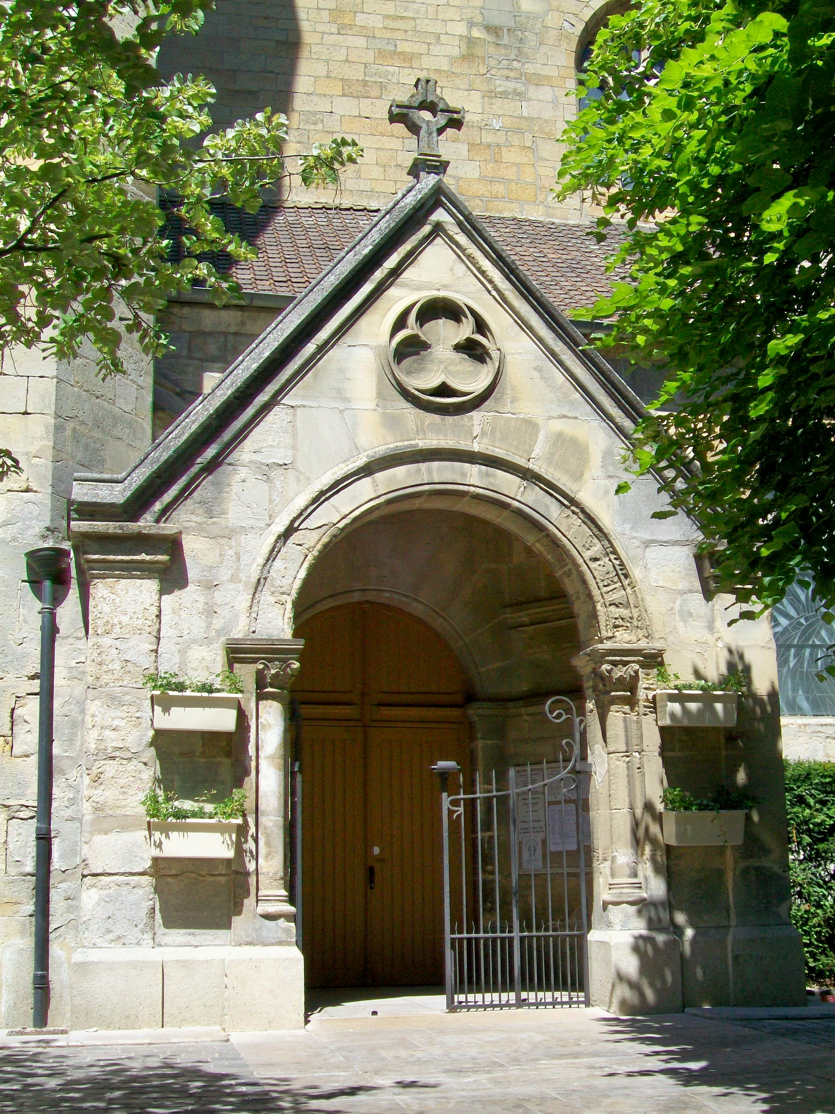 Le porche de l'église Sainte-Geneviève, qui est inscrite Monument historique depuis le 5 novembre 1988.